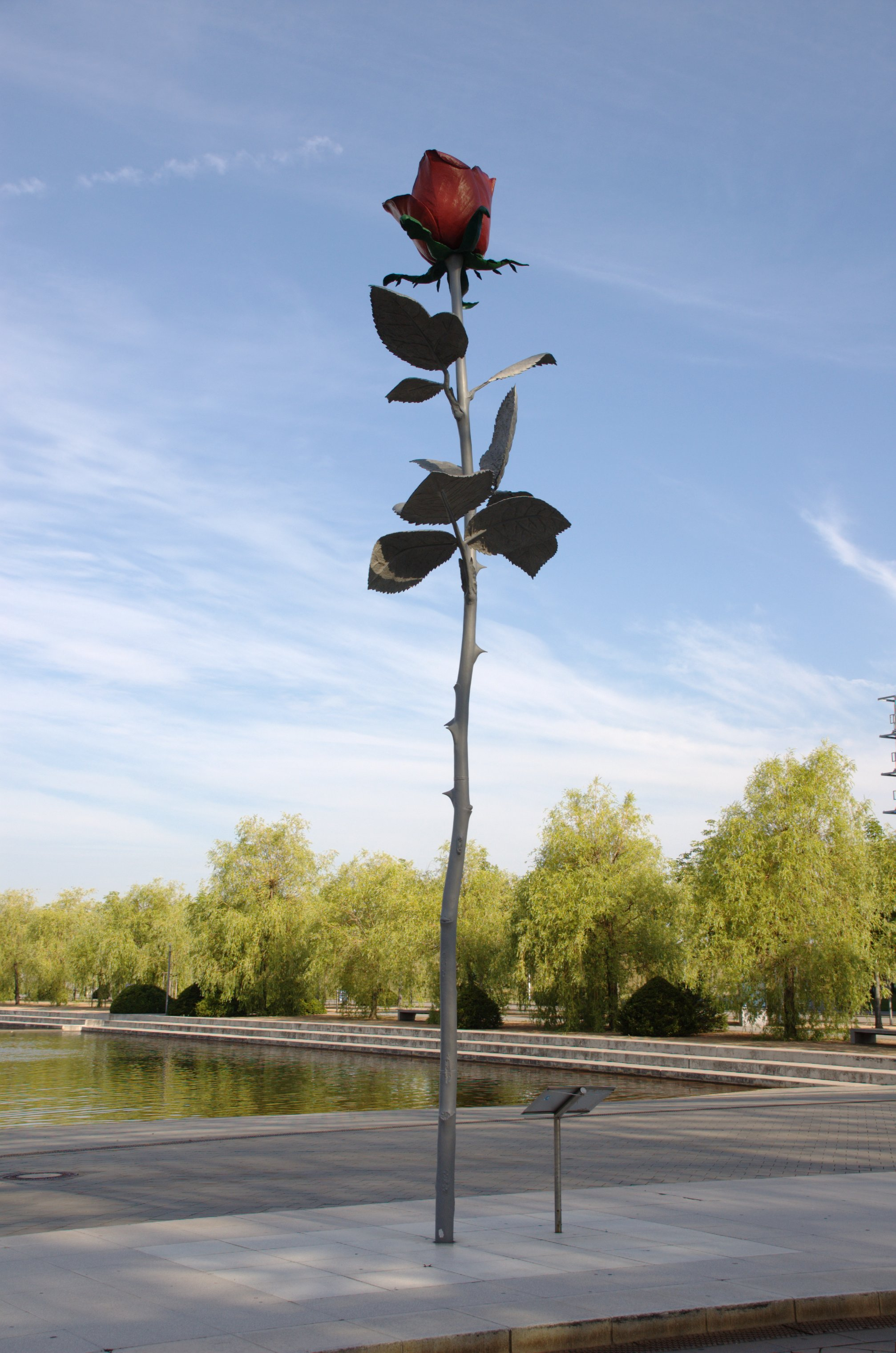 Isa Genzken: Rose, in front of Neue Leipziger Messe, Leipzig, Germany